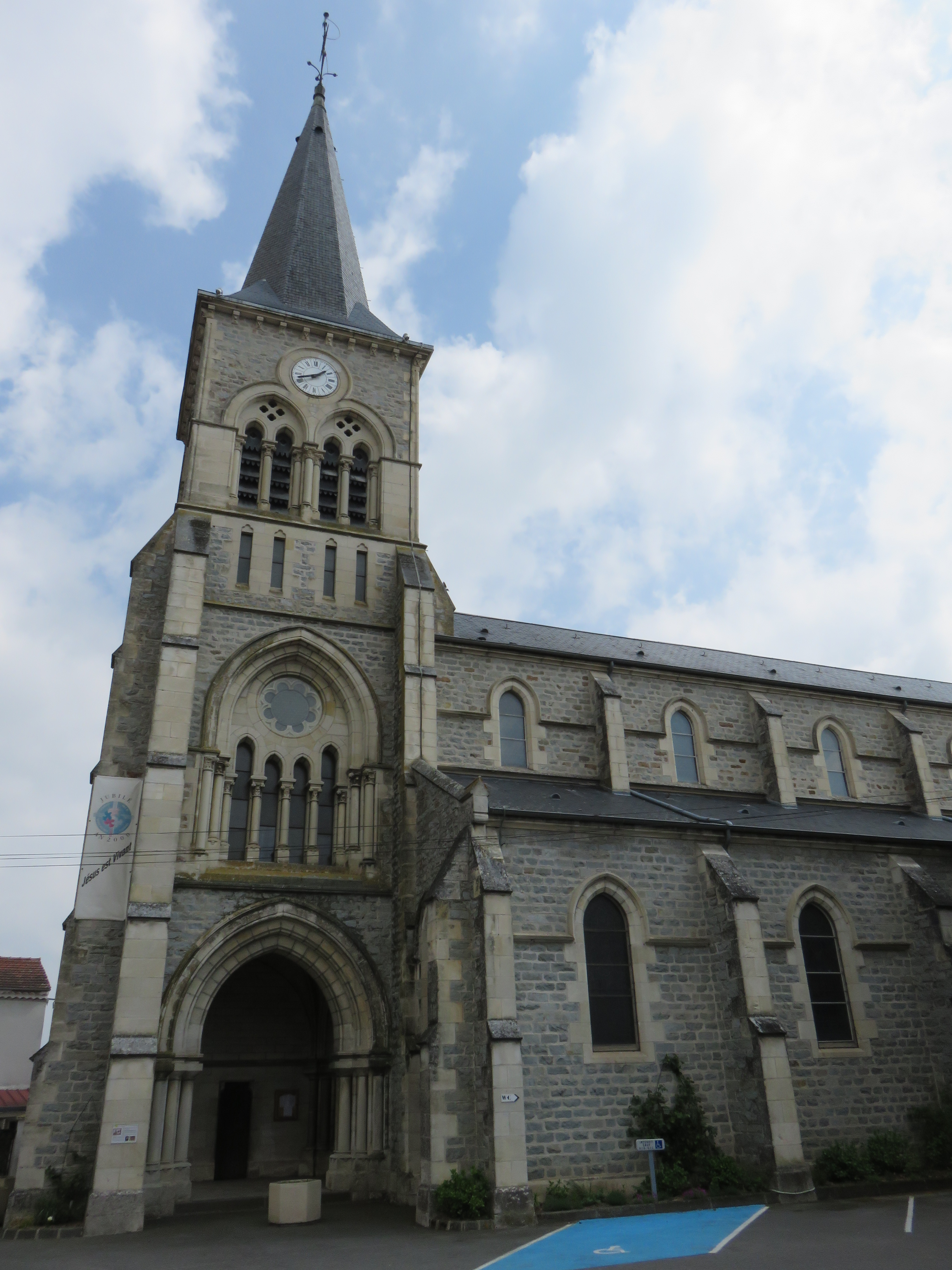 L'église Saint-Martin de Nervieux à Nervieux (Loire, France).